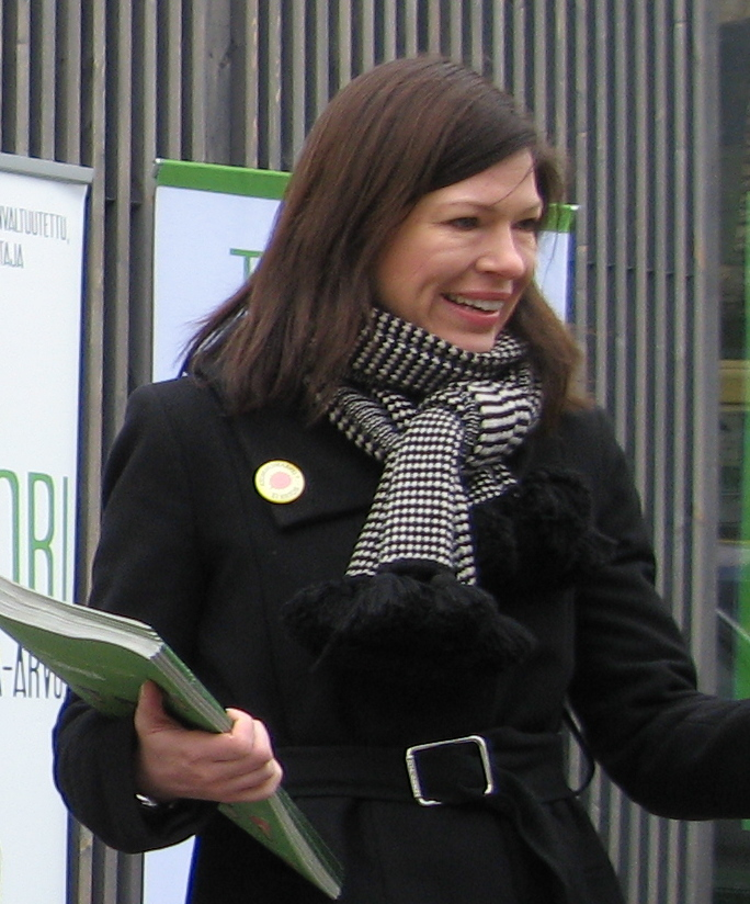 Anni Sinnemäki Kolmen Sepän Aukiolla.